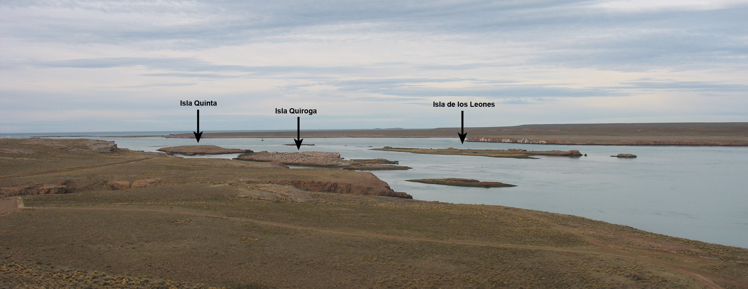 Vista de las islas Quinta, Quiroga y de los Leones, las tres de la ría Deseado (con referencias) (Santa Cruz, Patagonia Argentina)